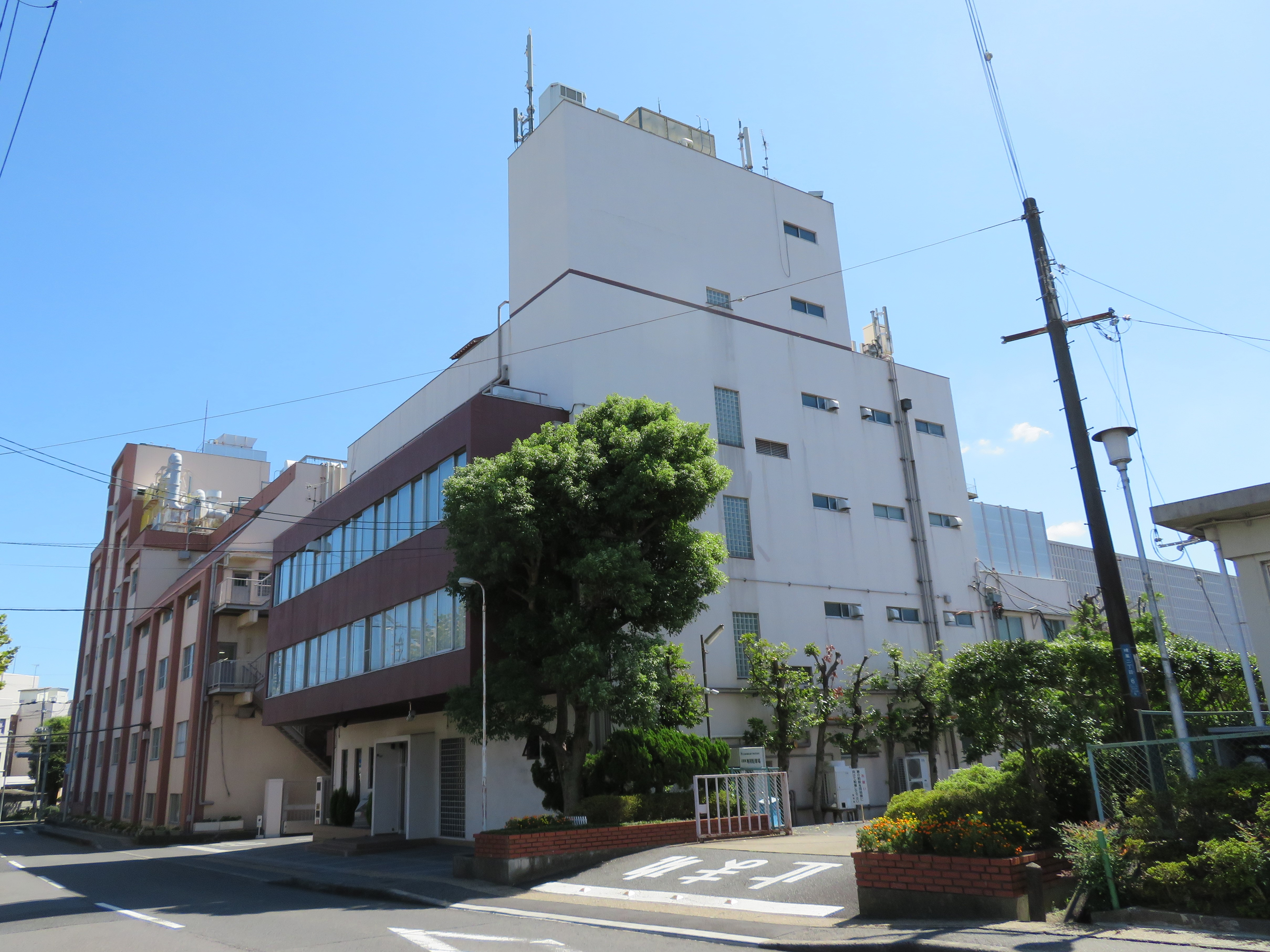 日本電気硝子株式会社本社